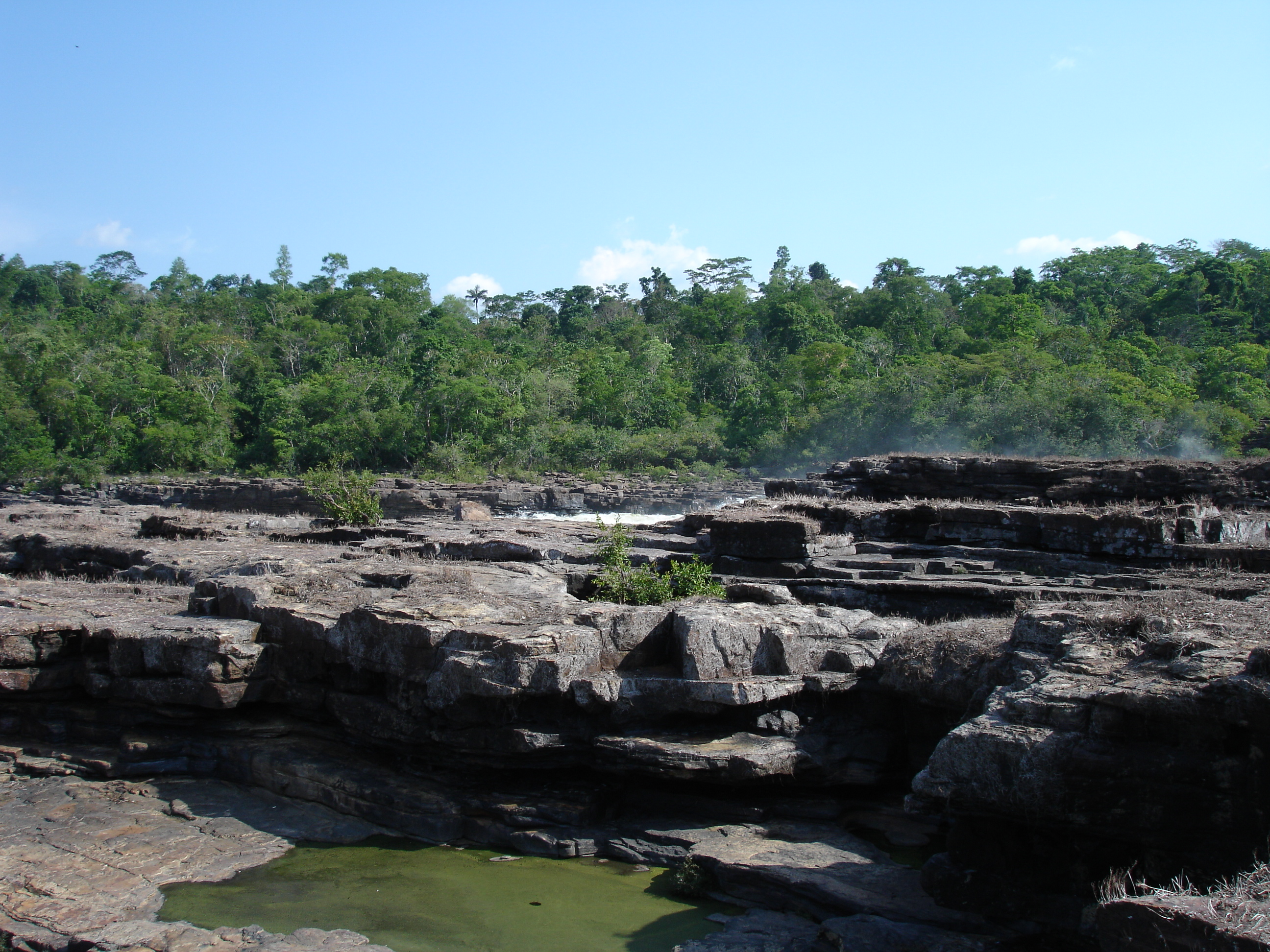 Salto Augusto upper rock slabs